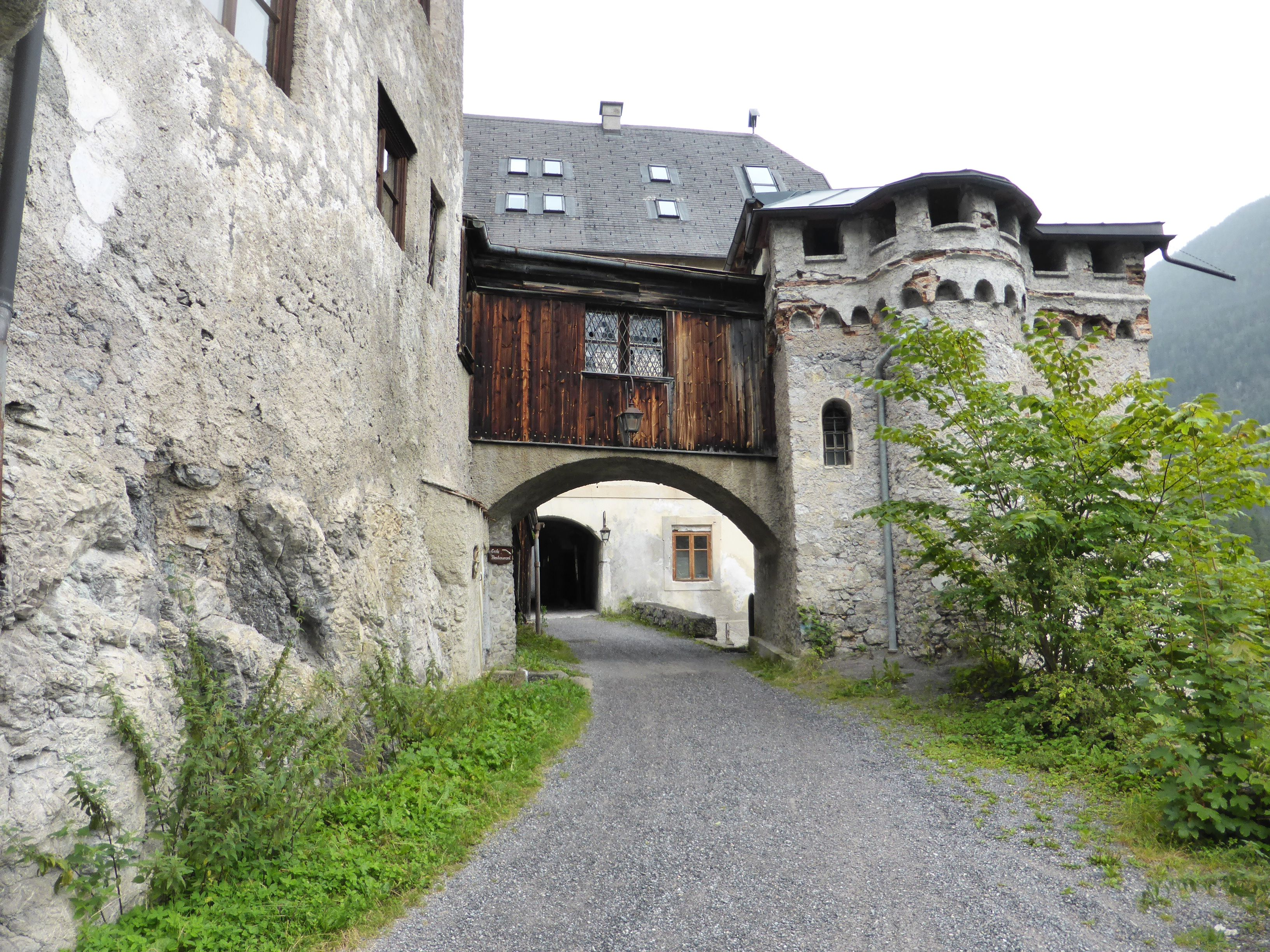 Schloss Fernstein/Klause Fernstein